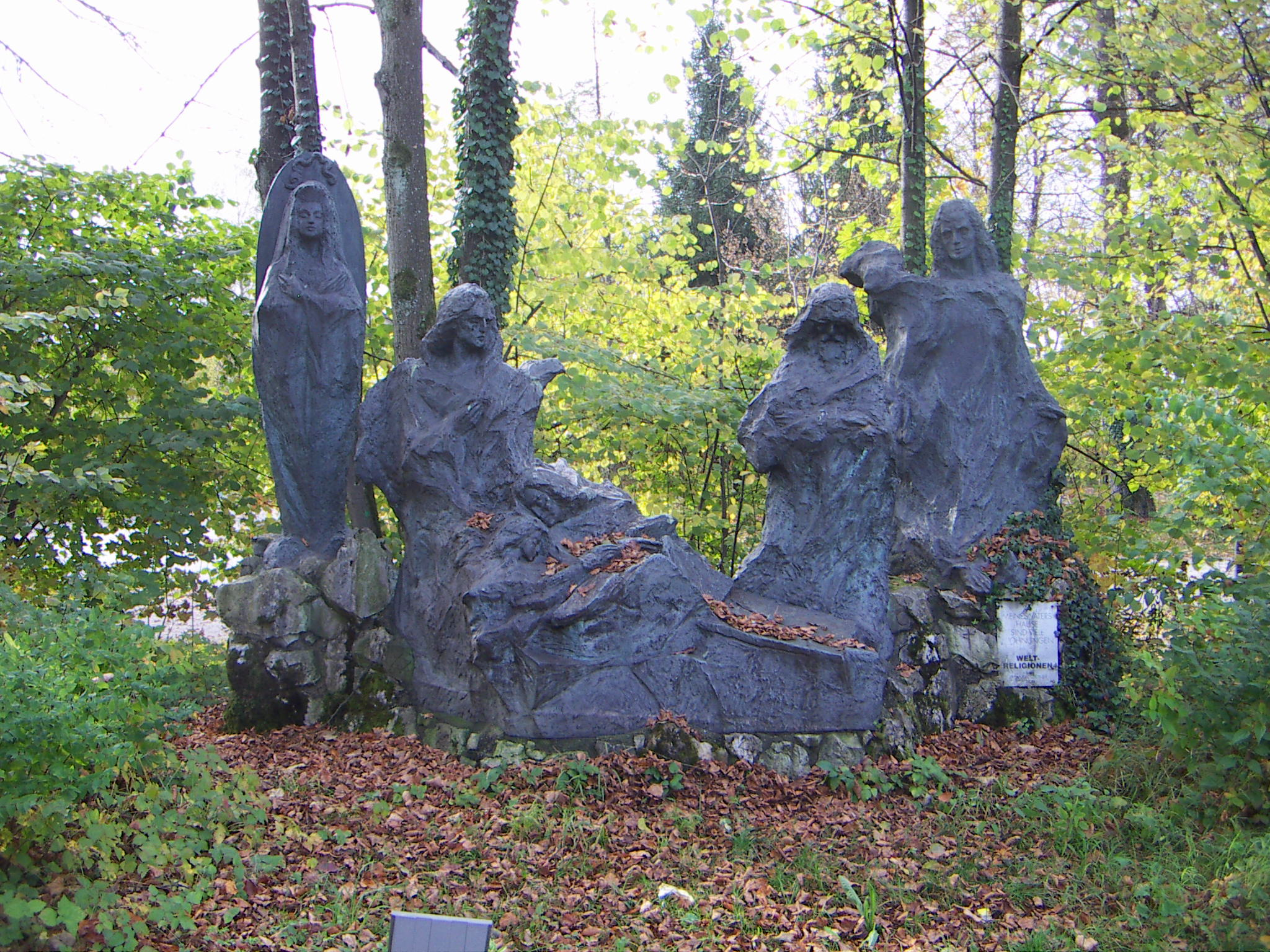 Plastik von Yrsa von Leistner im Skulpturenparks beim Bildungshaus Salzburg St. Virgil, Thema: Weltreligionen, Bibelstelle: In meines Vaters Hause sind viele Wohnungen Joh. 14,2